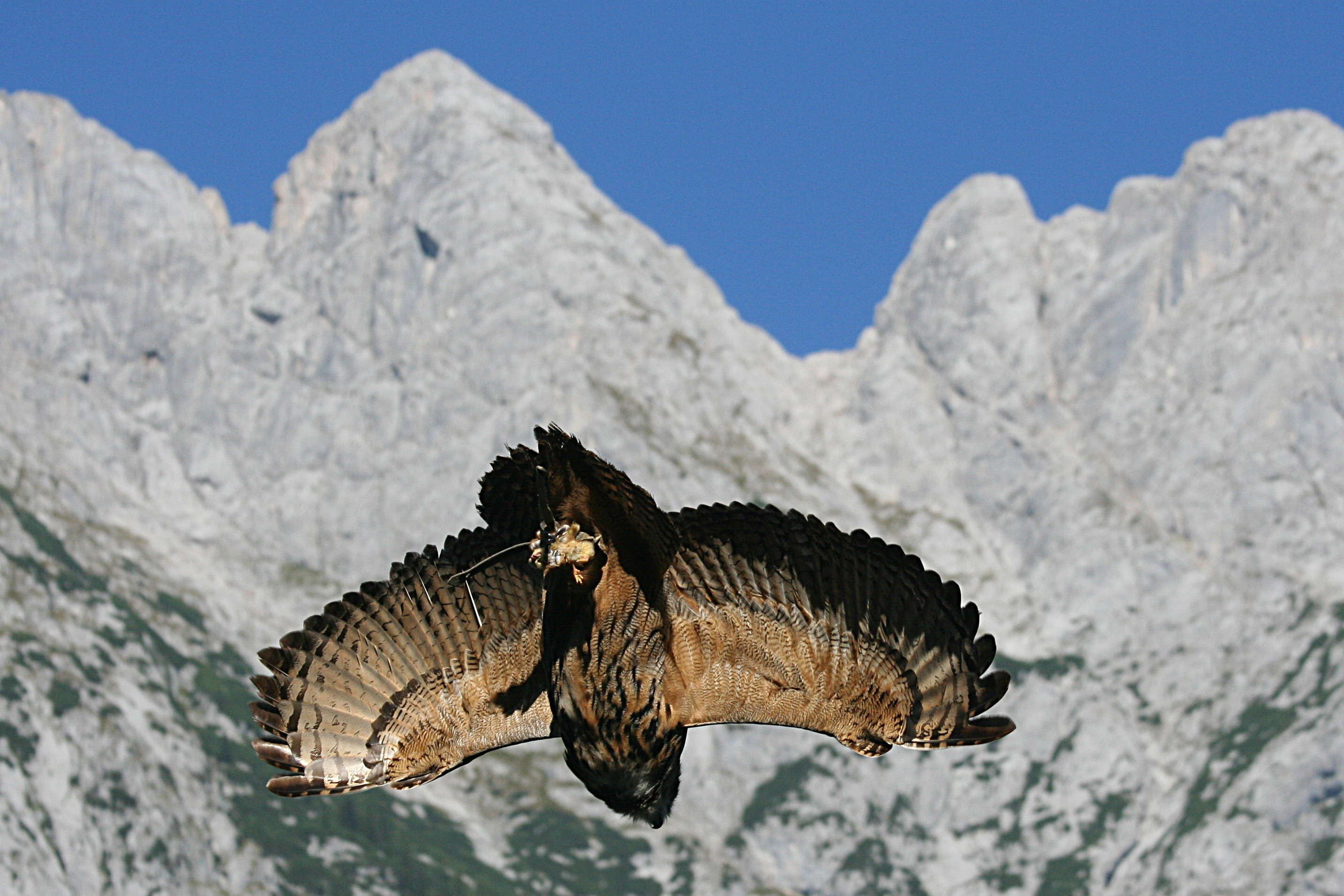 Owl